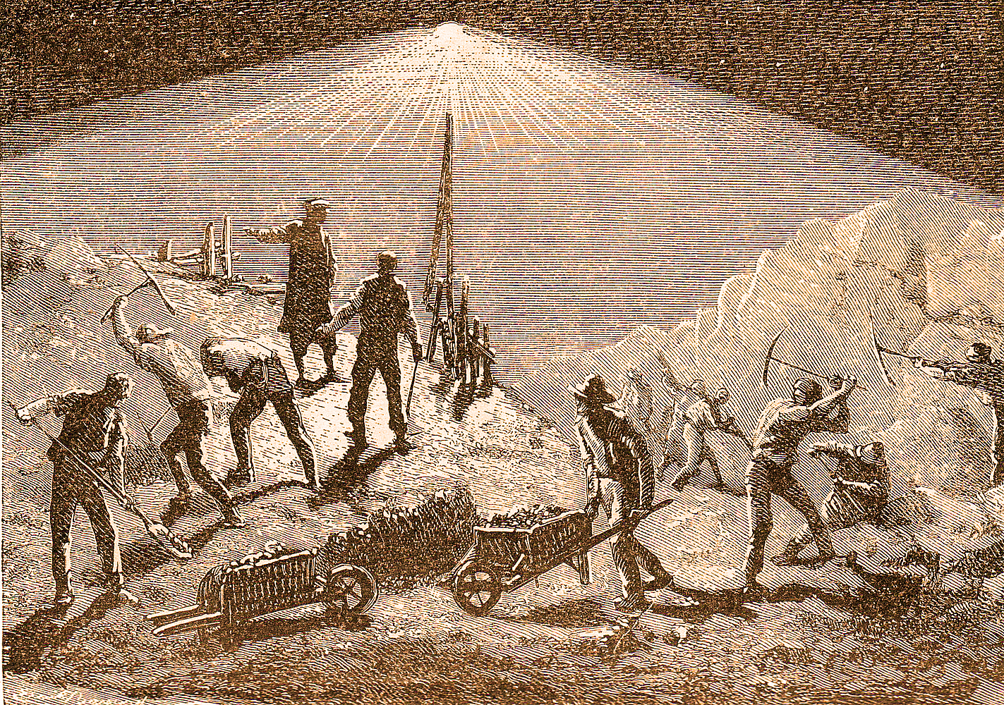 Extraction de l'ocre au fond de la mine à la lumière électrique